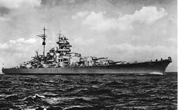 È una foto tratta dalla prima missione della nave, il copyright è un PD del United States Navy's Naval Historical Center